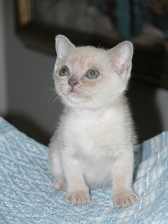 bjtripp